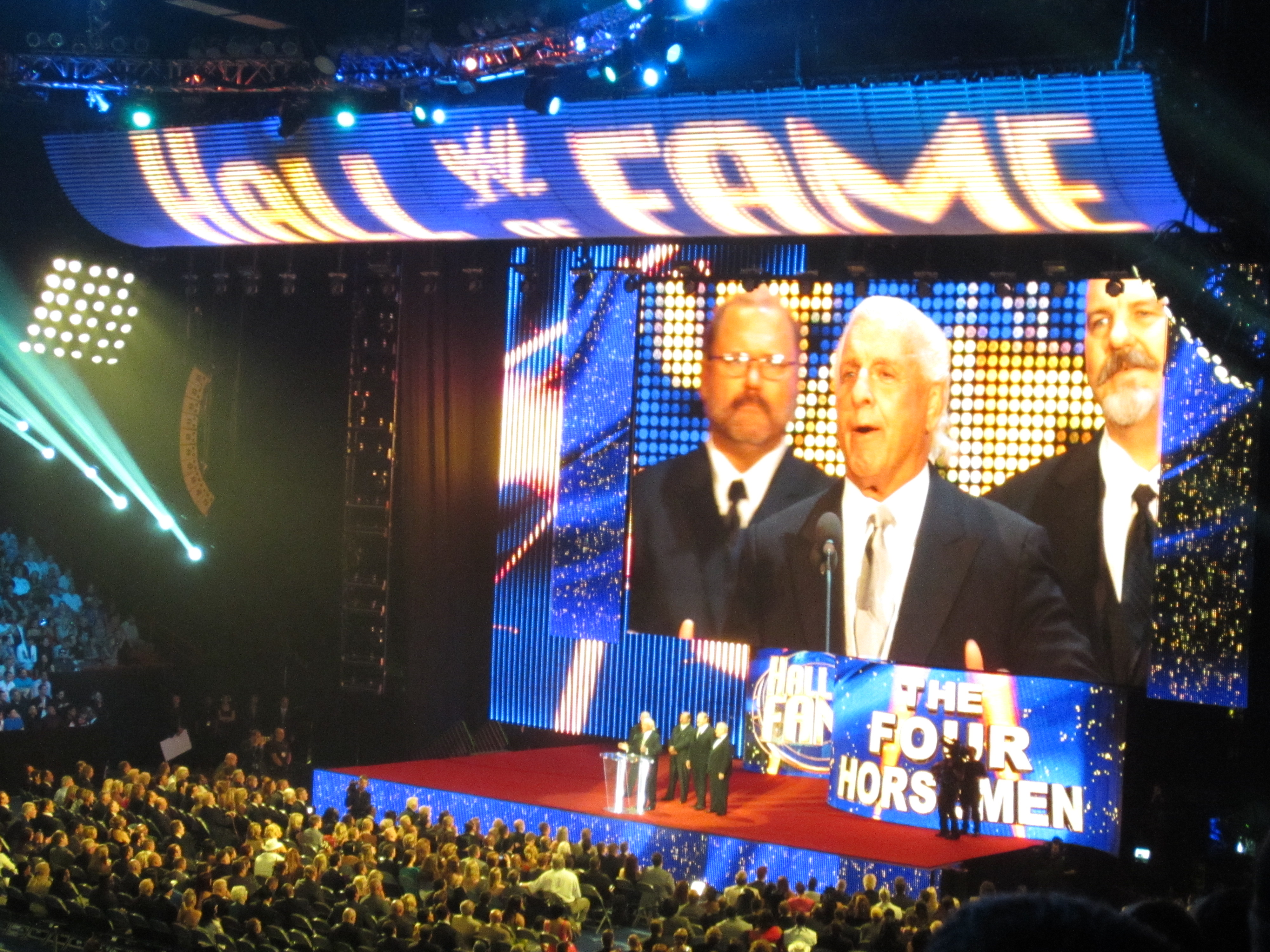 Woooooo